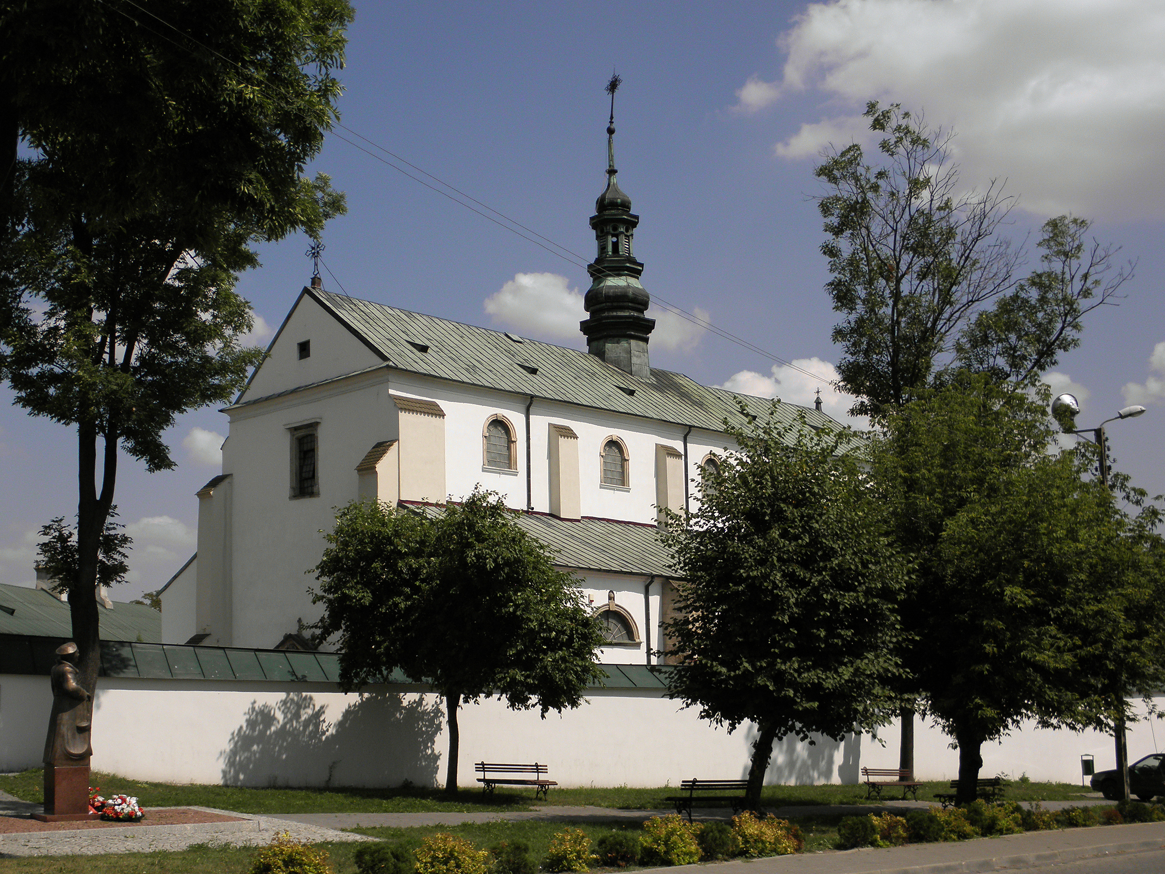 Kościół p.w. Wniebowzięcia NMP - widok z ul.Radomskiej.